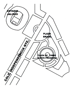 Ubicacion estadio jalisco